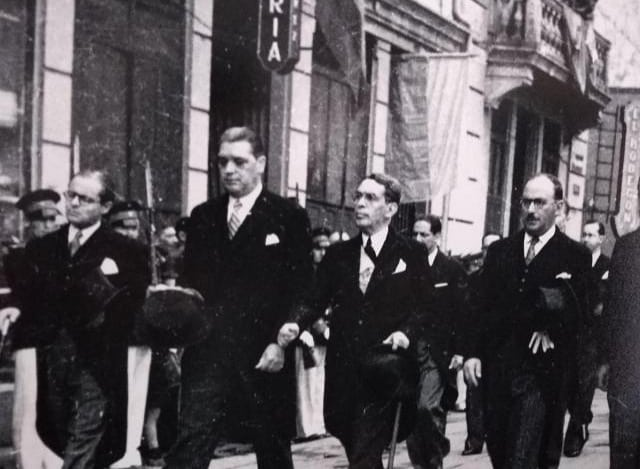 Libro familiar familia Montejo